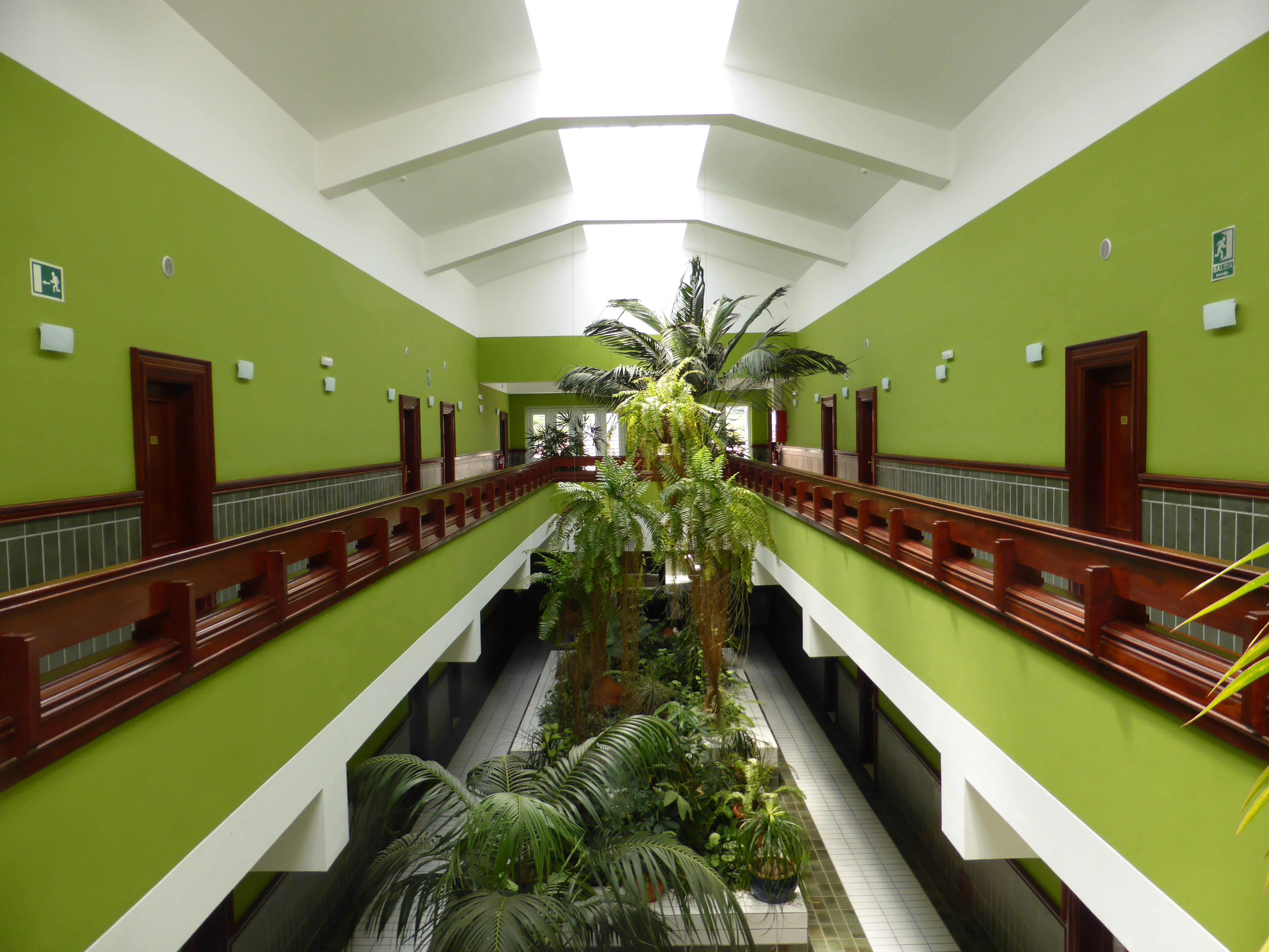 Interior del Hotel Balneario, gestionado por el Cabildo Insular de El Hierro. El establecimiento está cerca del antiguo pozo de aguas minero-medicinales.